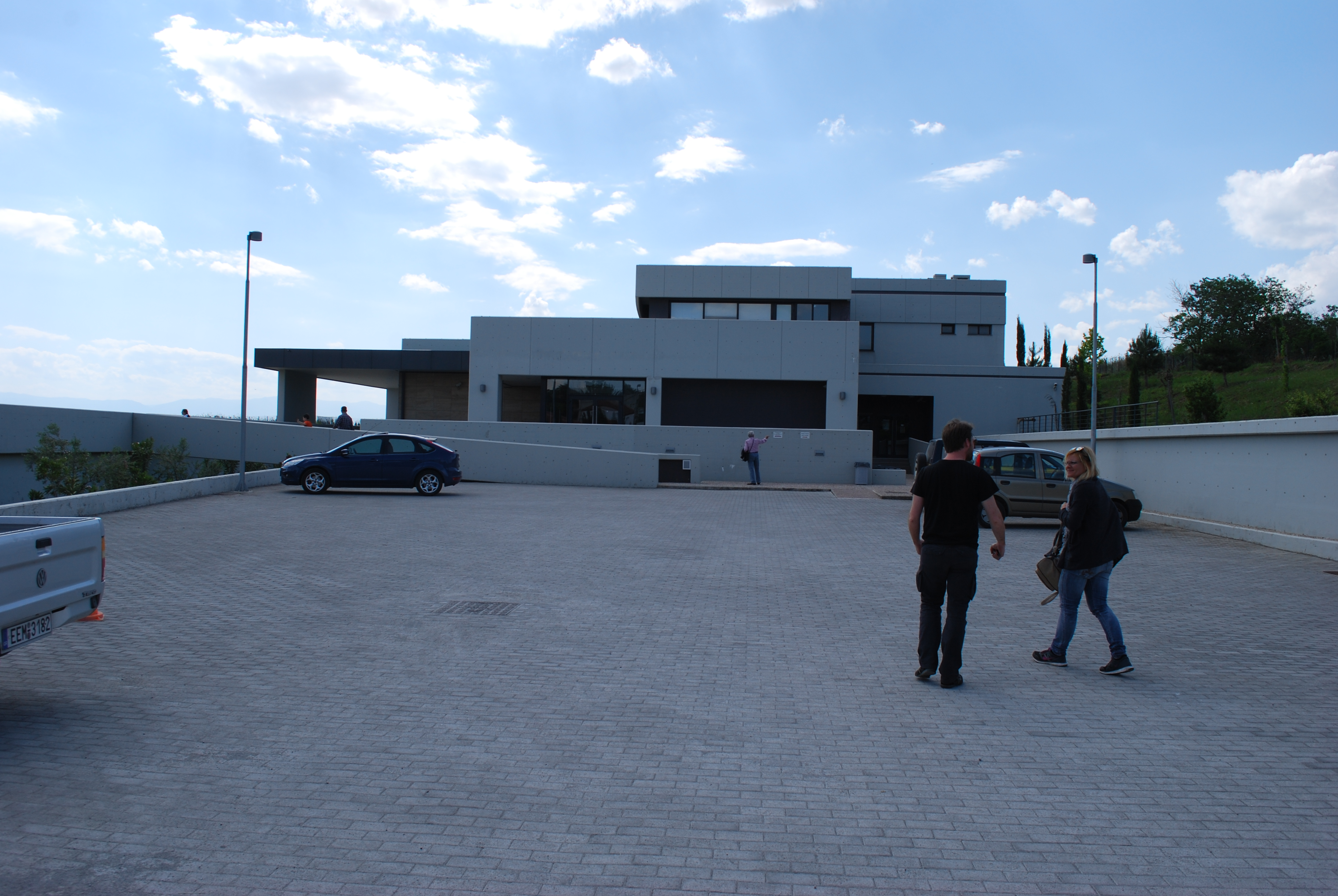 Vue du musée archéologique de Pella, en Macédoine (Grèce).